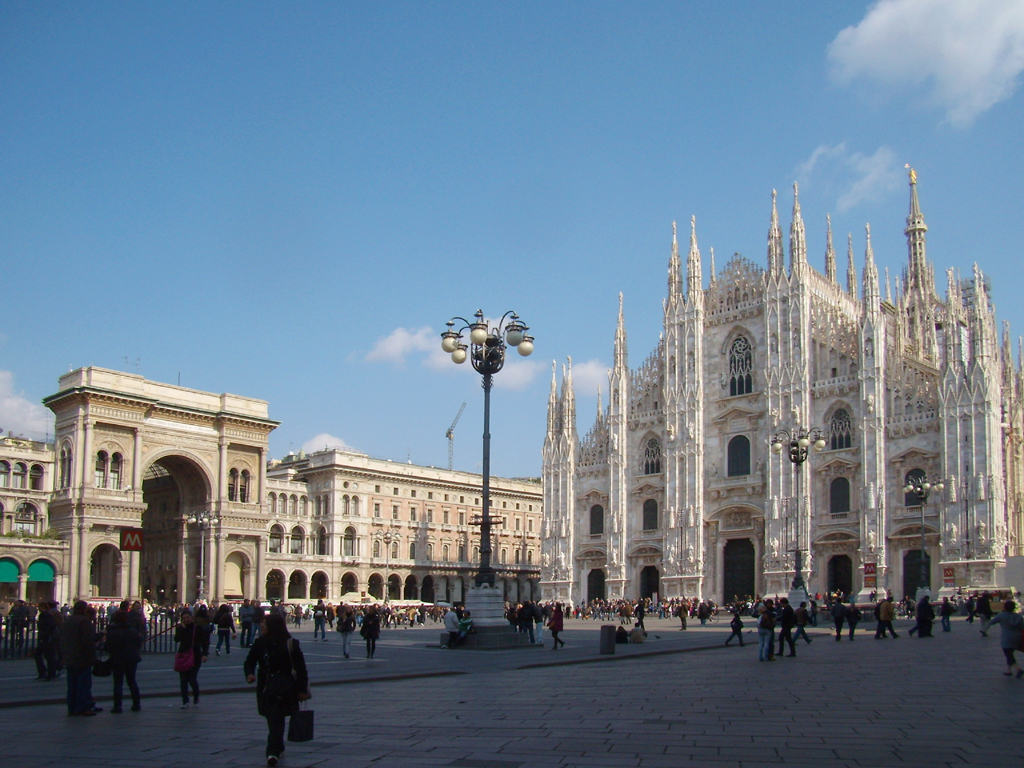 vista di piazza del Duomo a Milano